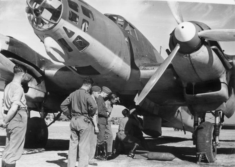 Title: Spanien, Flugzeug der Legion Condor Extra information: Spanien.- Beladung einer Heinkel He 111 E mit Bomben Factual corrections and alternative descriptions are encouraged separately from the original description. Additionally errors can be reported at this page to inform the Bundesarchiv. Original historic description: Zentralbild "Legion Condor" in Spanien Faschistische deutsche Interventionstruppen unterstützen den Francoputsch 1936 - 1939 gegen die demokratische Republik Spanien. UBz.: Auf dem Flugplatz Levida. Beim Einhängen der Bomben. C 0214/07/13 N